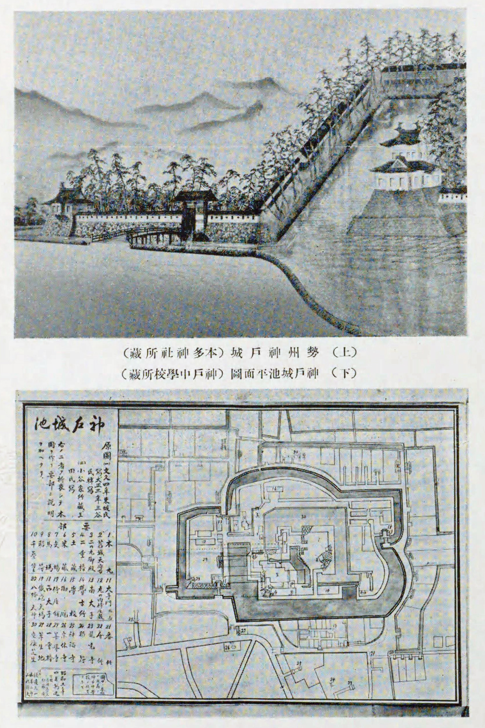 上：勢州神戸城（本多神社所蔵）。 下：神戸城池平面図（神戸中学校所蔵）。